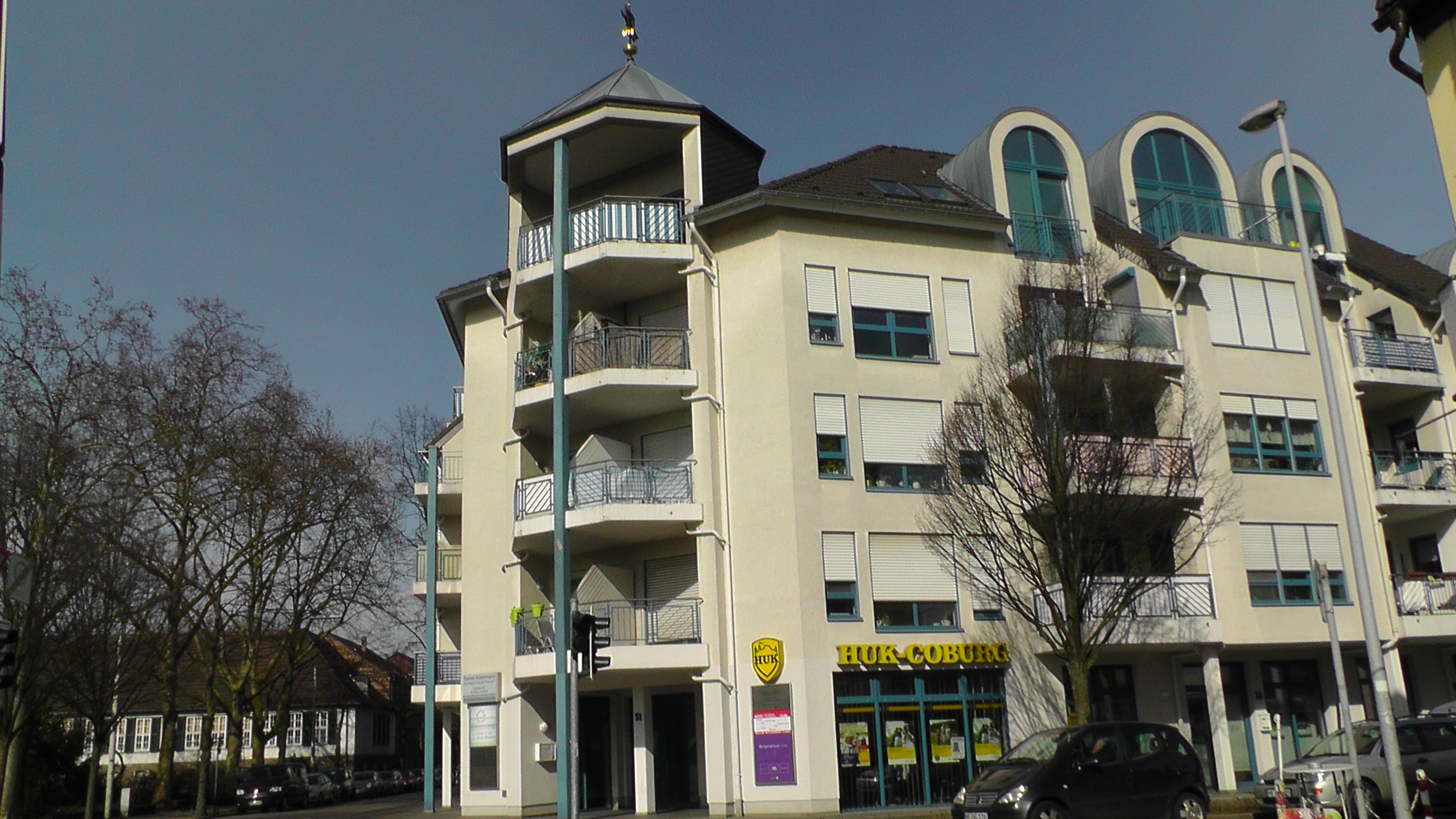 Hilden, Ecke Schul-Südstraße 51